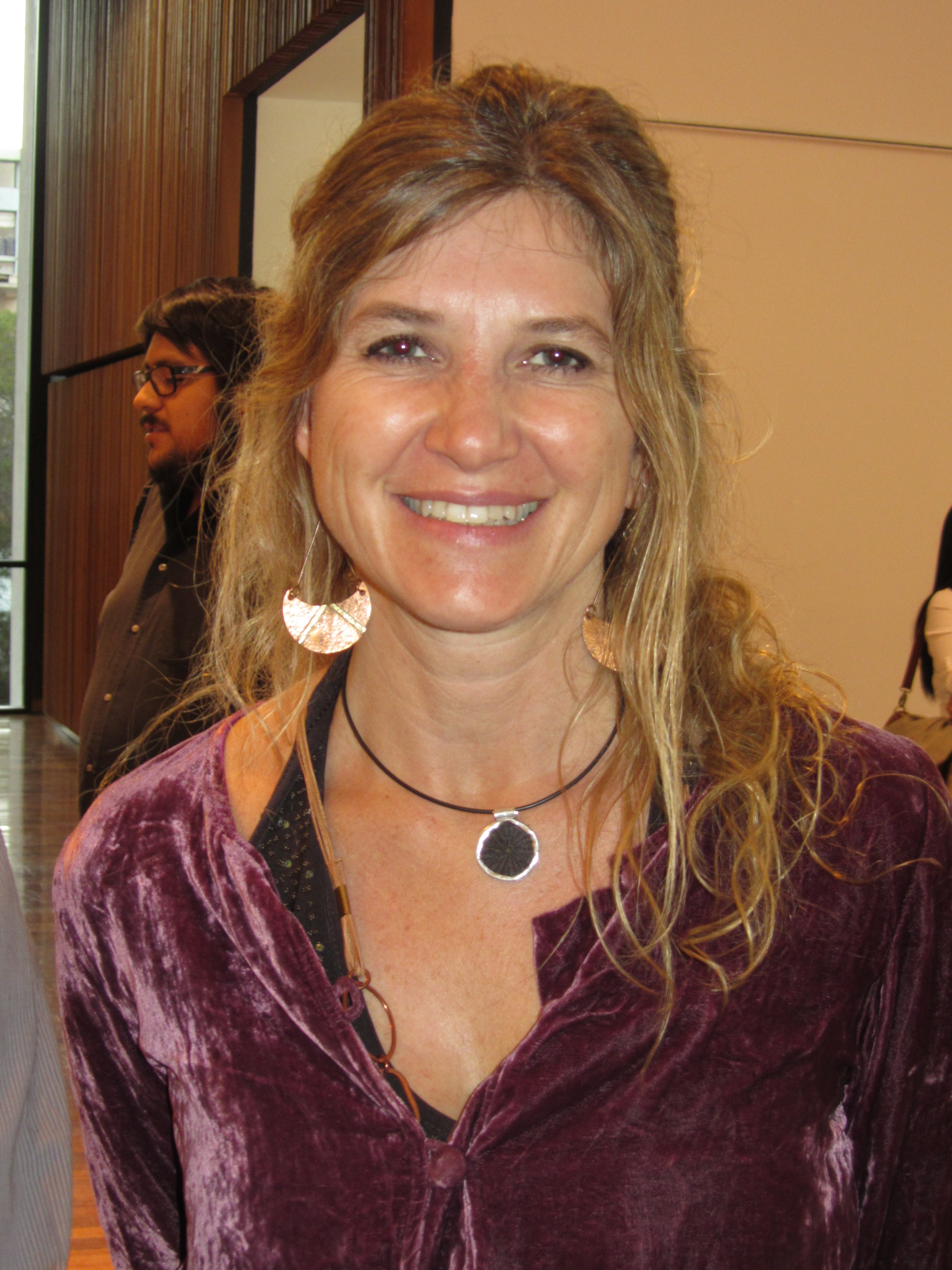 La escritora chilena Andrea Jeftanovic en la presentación del libro de Macarena Areco Cartografía de la novela chilena reciente: realismos, experimentalismos, hibridaciones y subgéneros, realizada en el Centro Cultural Gabriela Mistral el 2 de abril de 2015